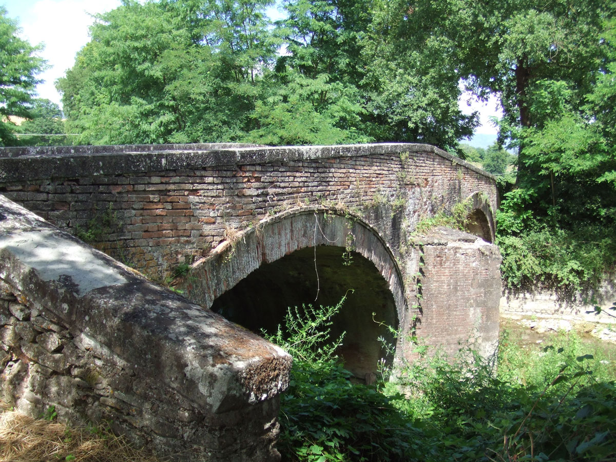 Pont de Cimabue près de Vicchio dans le Mugello (Cimabue's bridge near Vicchio - Mugello))